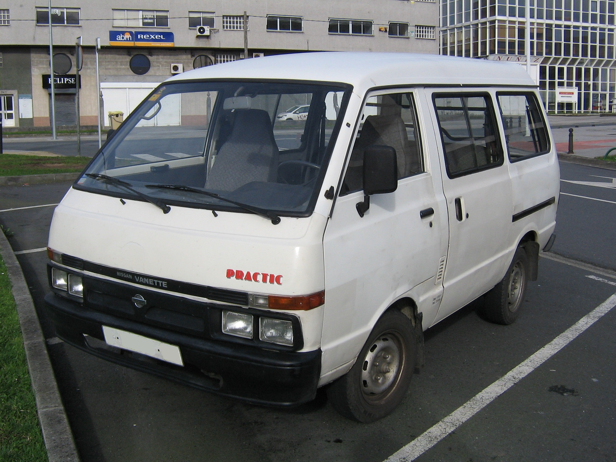 Una furgoneta Nissan Vanette Practic. Por la calandra se ve que es una de las últimas unidades de este modelo, que fue sucedido por las furgonetas Vanette E y Vanette Cargo, basadas en el monovolumen Nissan Serena.